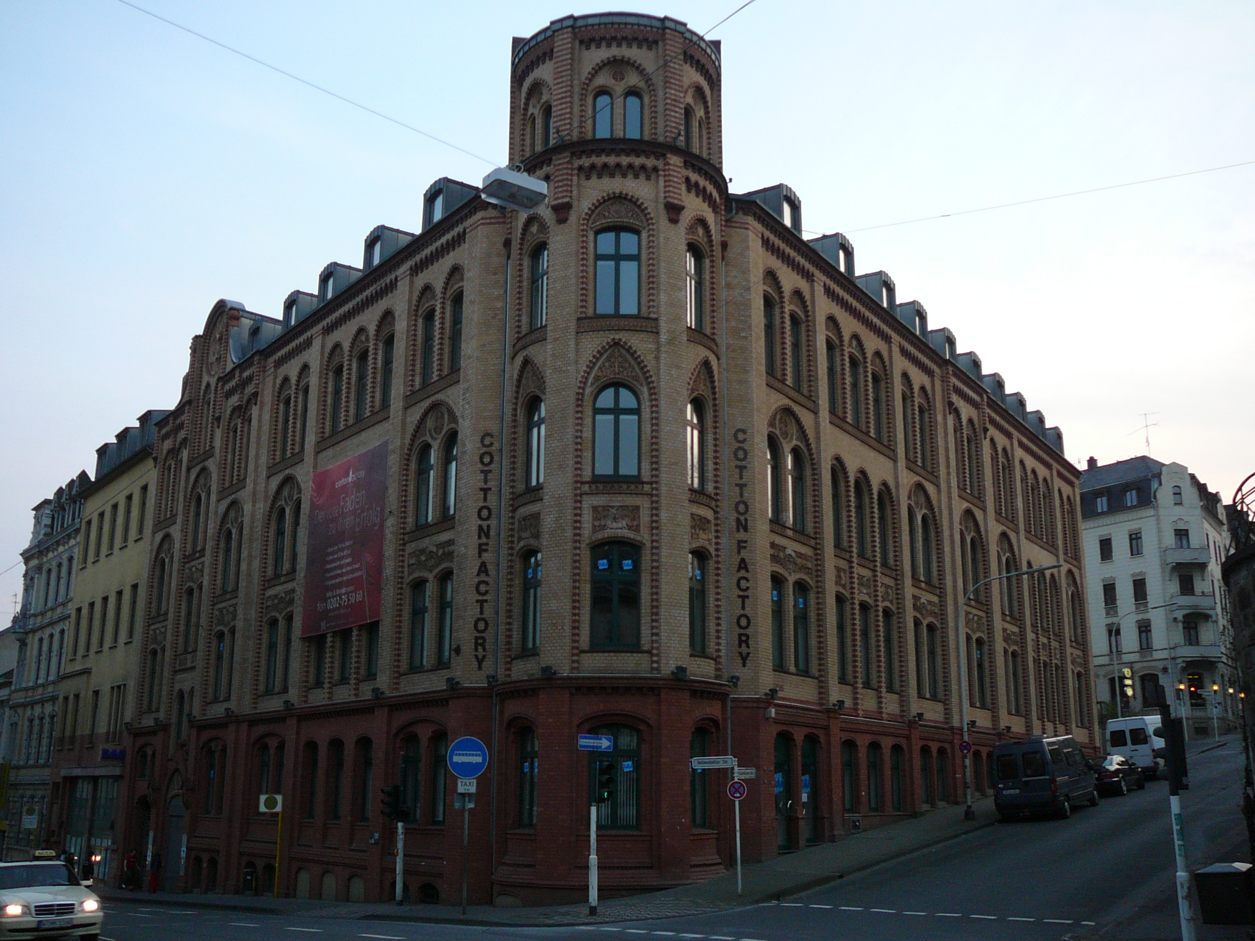 Uellendahler Straße, Wuppertal